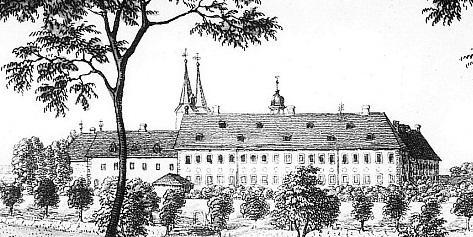 Huy-Röderhof. Blick zum Kloster Huysburg, aus: Eß, Carl van: Kurze Geschichte der ehem. Benedictinerabtei Huysburg, 1810